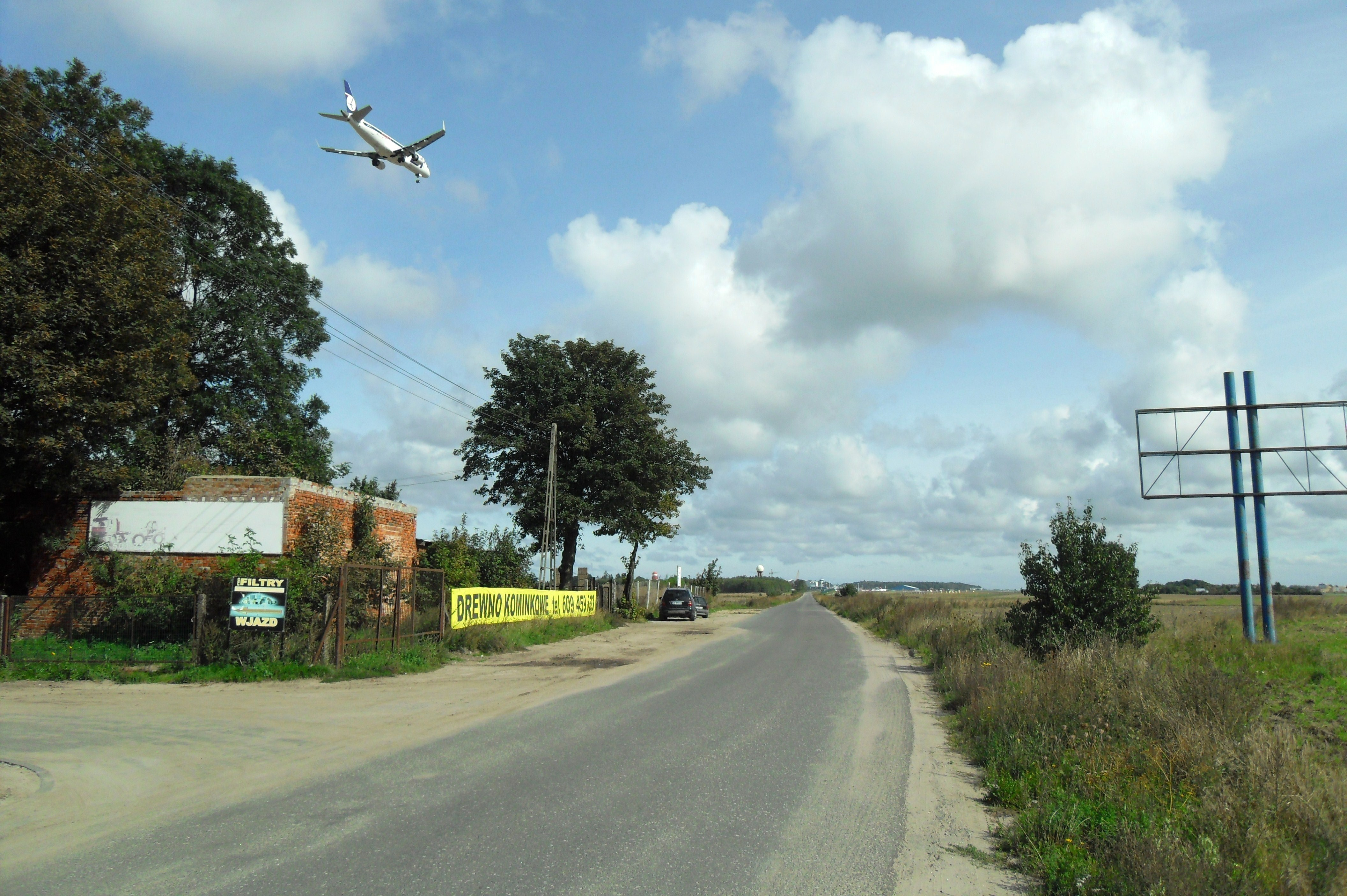 Gdańsk Rębiechowo, ul. Słowackiego i lądujący samolot.